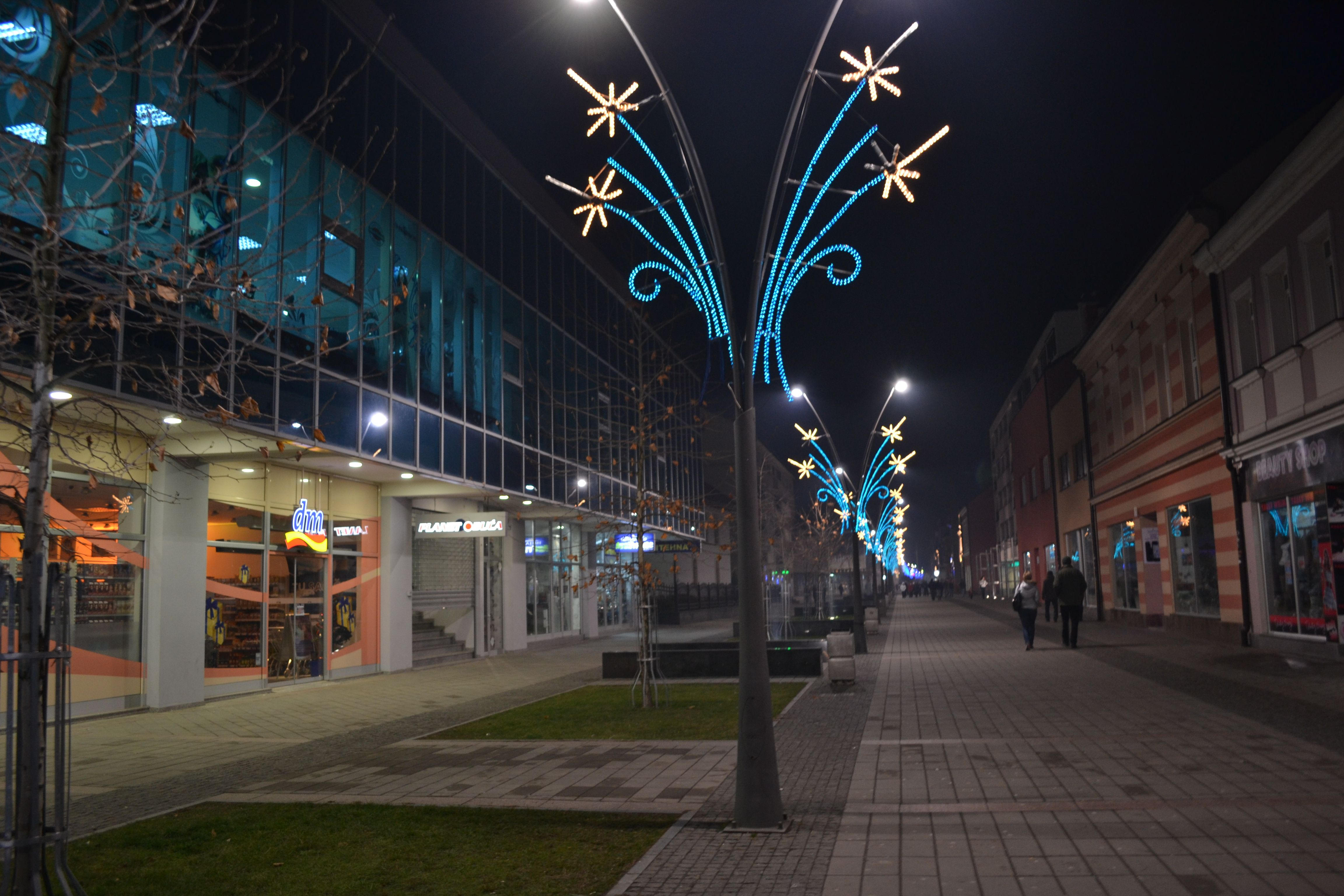 Nuovo viale nel centro di Prijedor